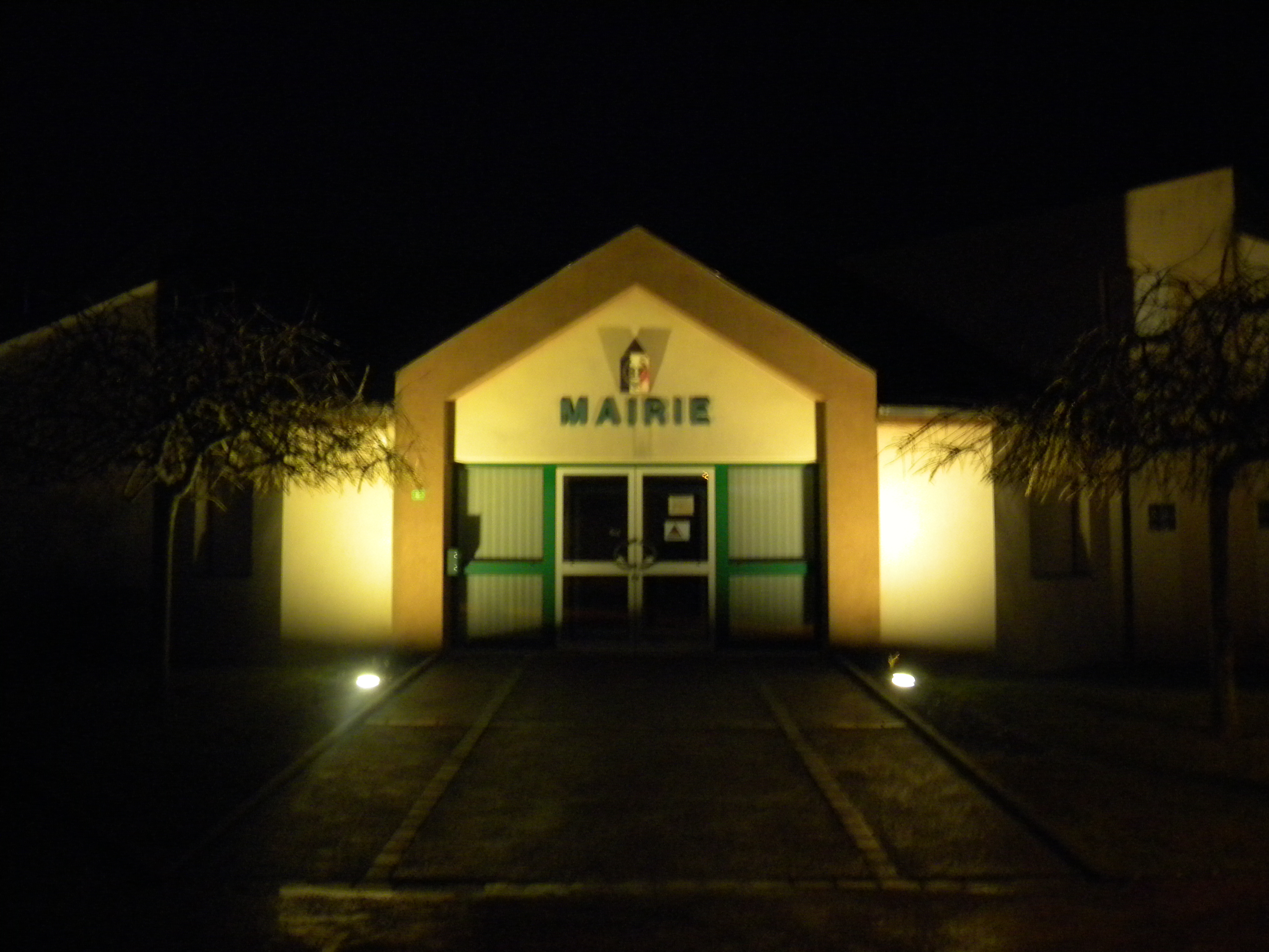 Urbodomo de Varanges.